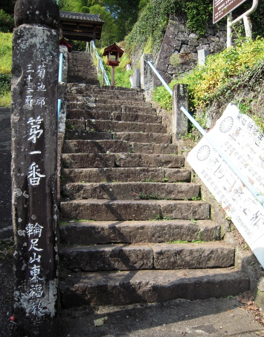 熊本県菊池市の東福寺